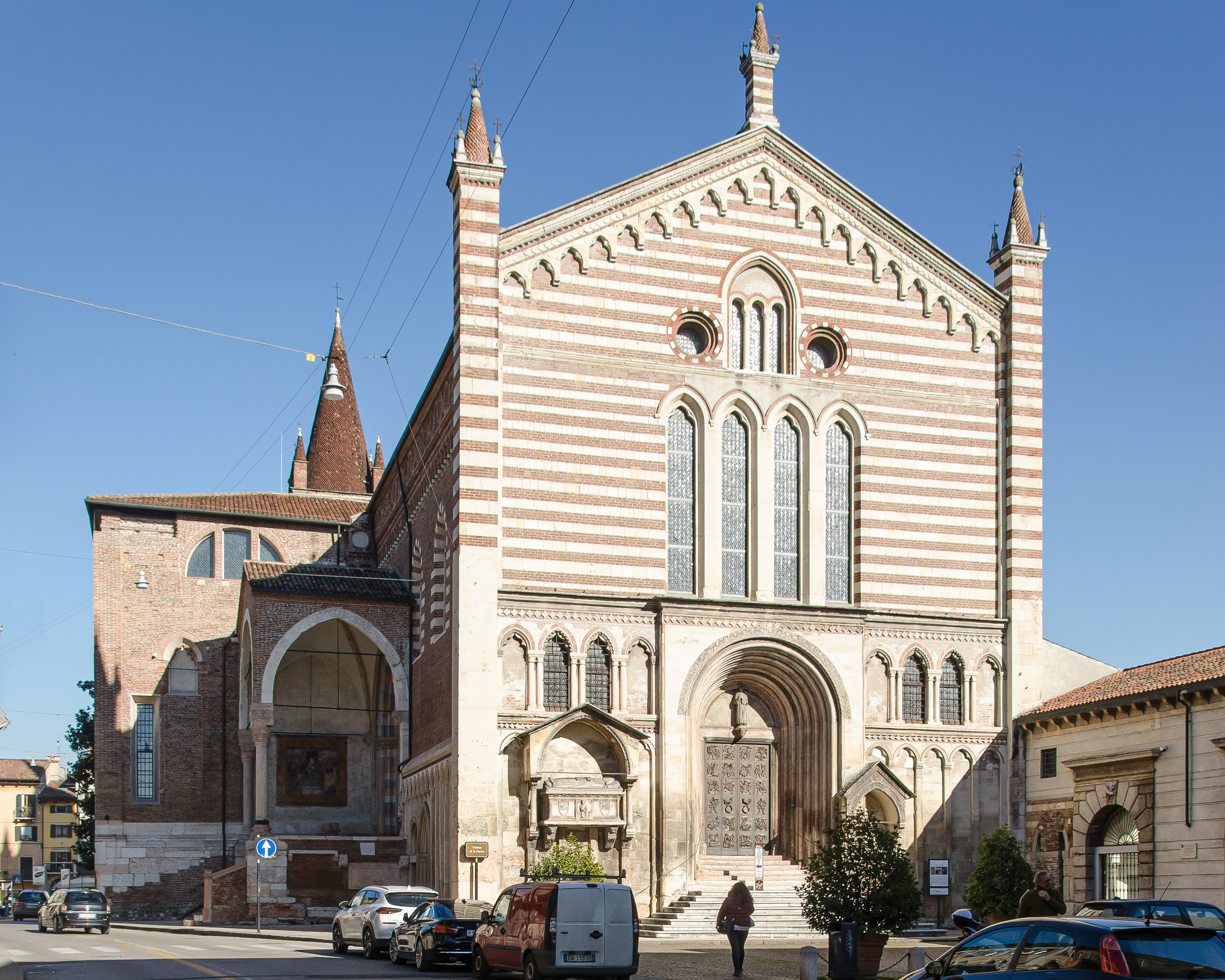 Fotografia dell'esterno